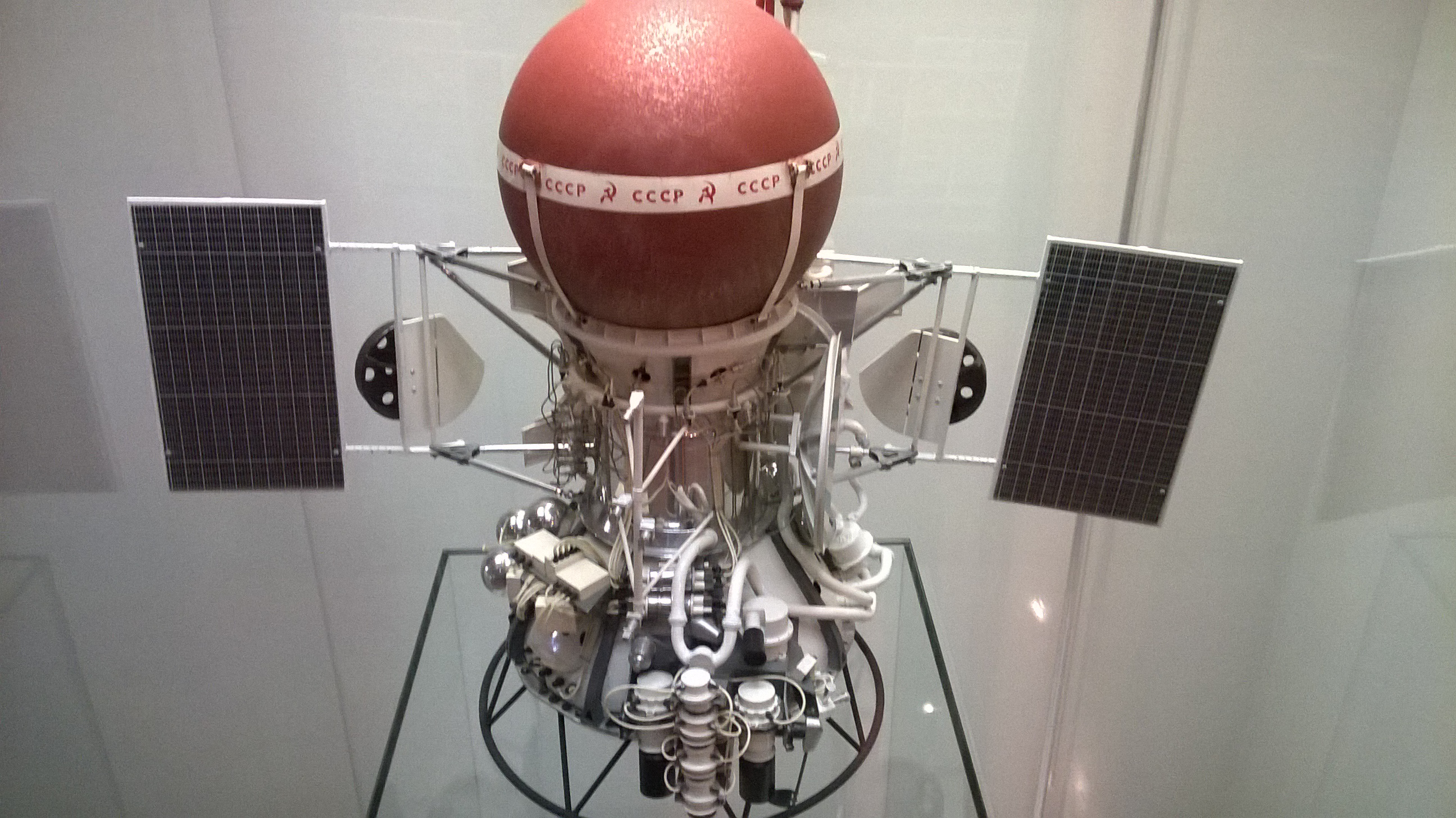 "Венера-10"